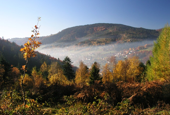 Brenna